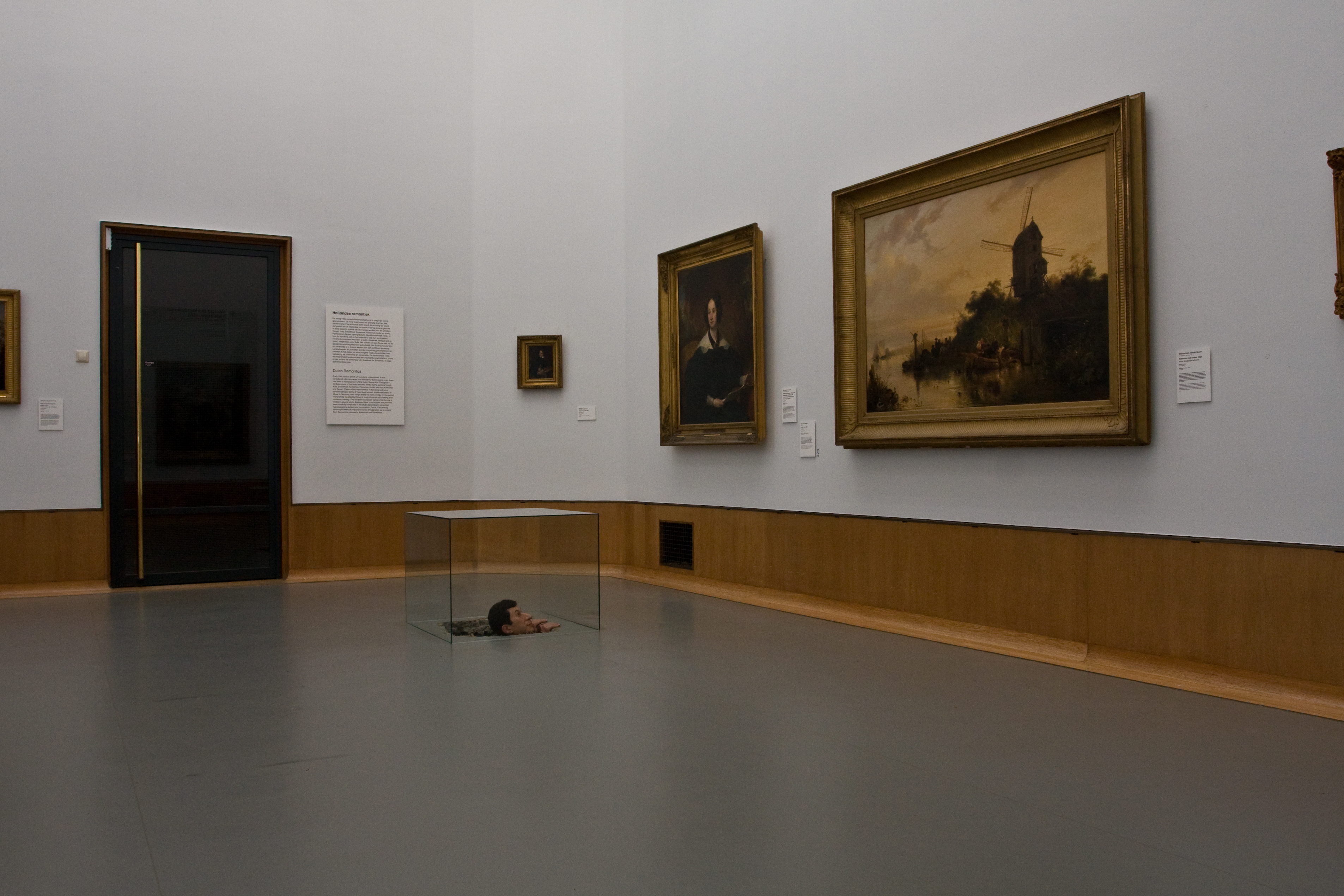 Boijmans van Beuningen - Zonder titel (Maurizio Cattelan)